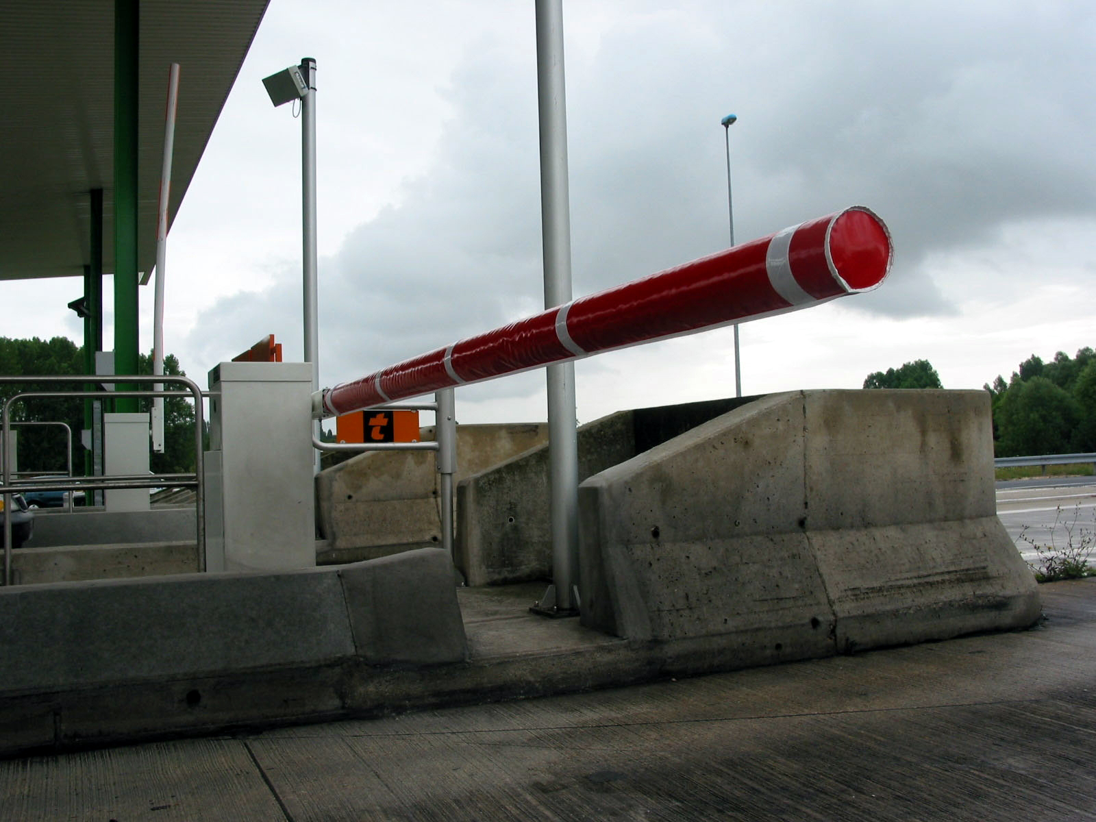 Prot-slagboom